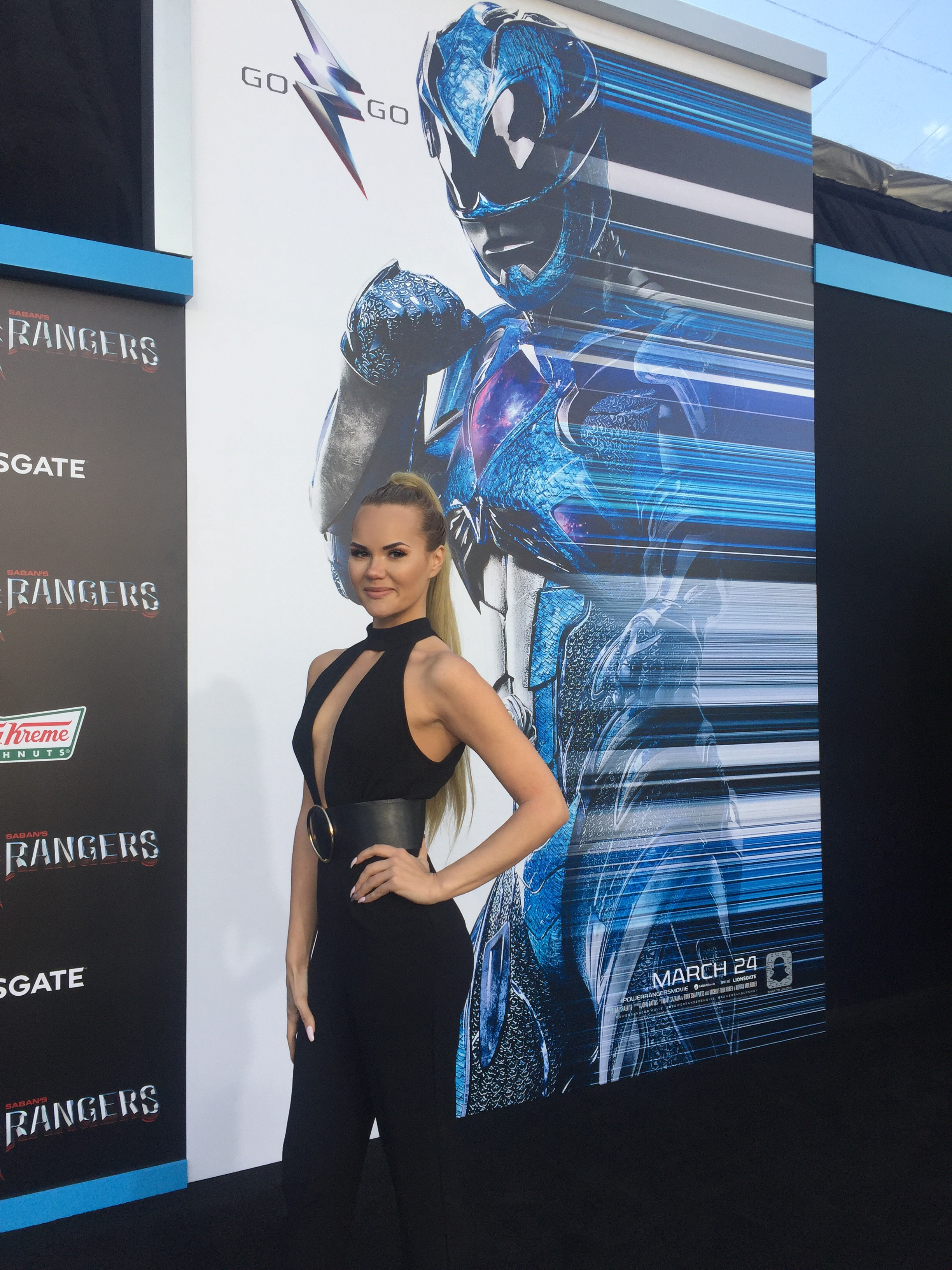 Ine Back Iversen på rød løper i Los Angeles under premieren av filmen Power Rangers.